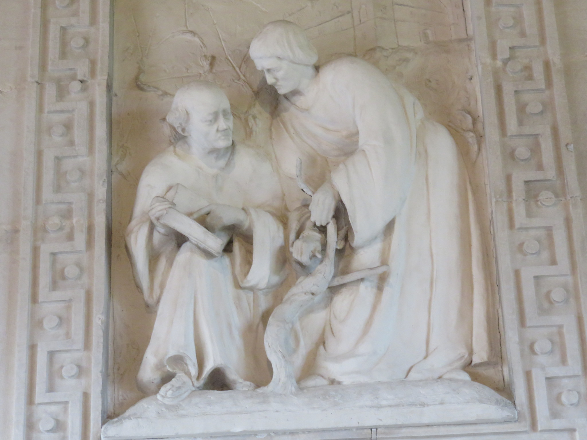 Interiors of Clos Vougeot